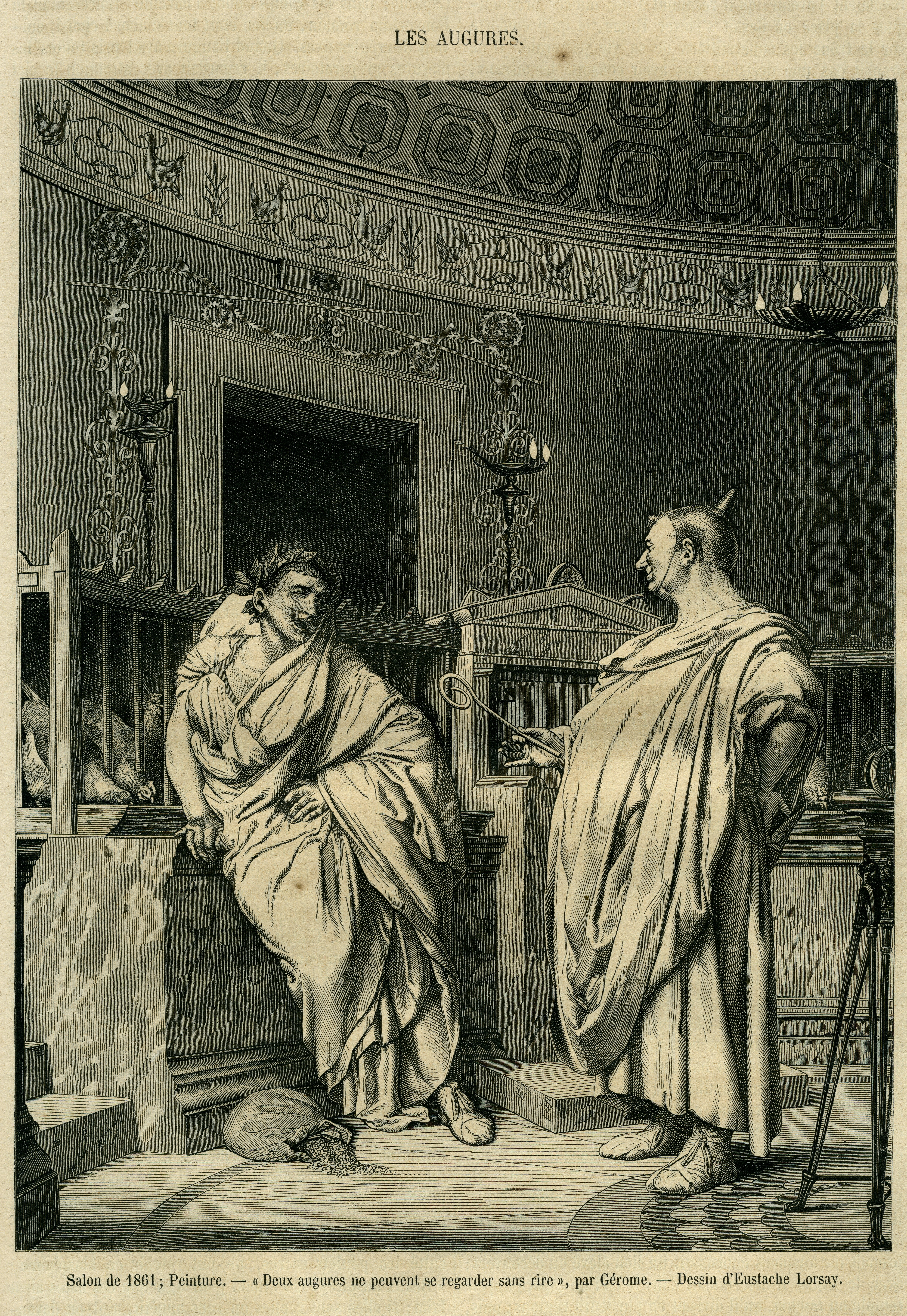 from Le Magasin Pittoresque, 1860s